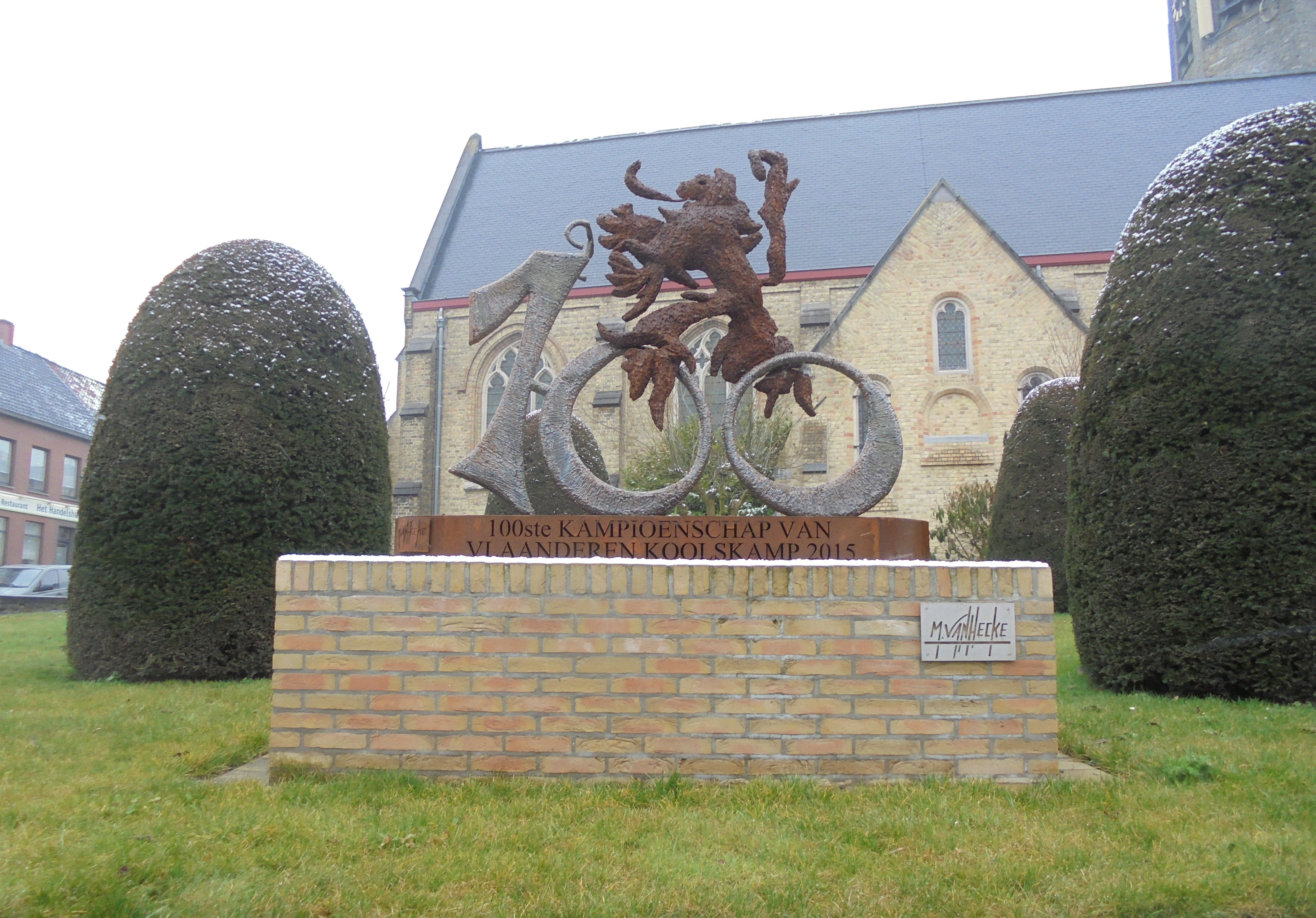 Monument 100 jaar Kampioenschap van Vlaanderen Wielrennen - nabij de Sint-Martinuskerk - Dorpsplein - Koolskamp - Ardooie - West-Vlaanderen - België